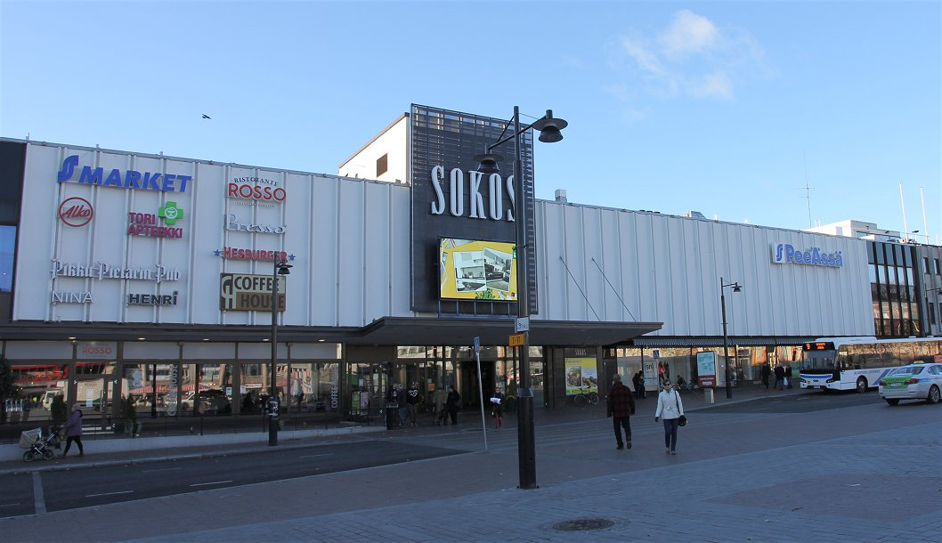 Kuopion Sokos -tavaratalo sijaitsee Kuopion keskustassa Kuopion torin länsilaidalla. Tavaratalon osoite on Haapaniemenkatu 24-26.